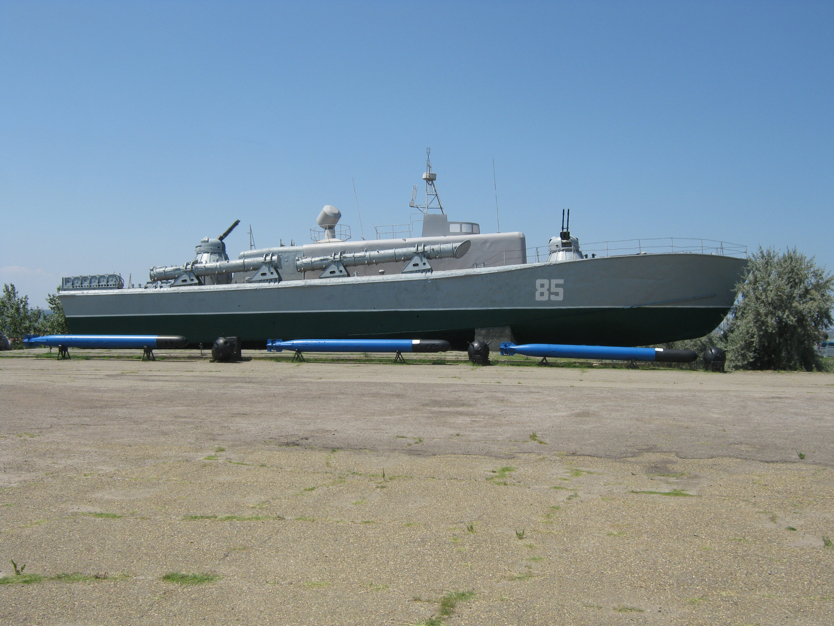 Военная горка (Темрюк)